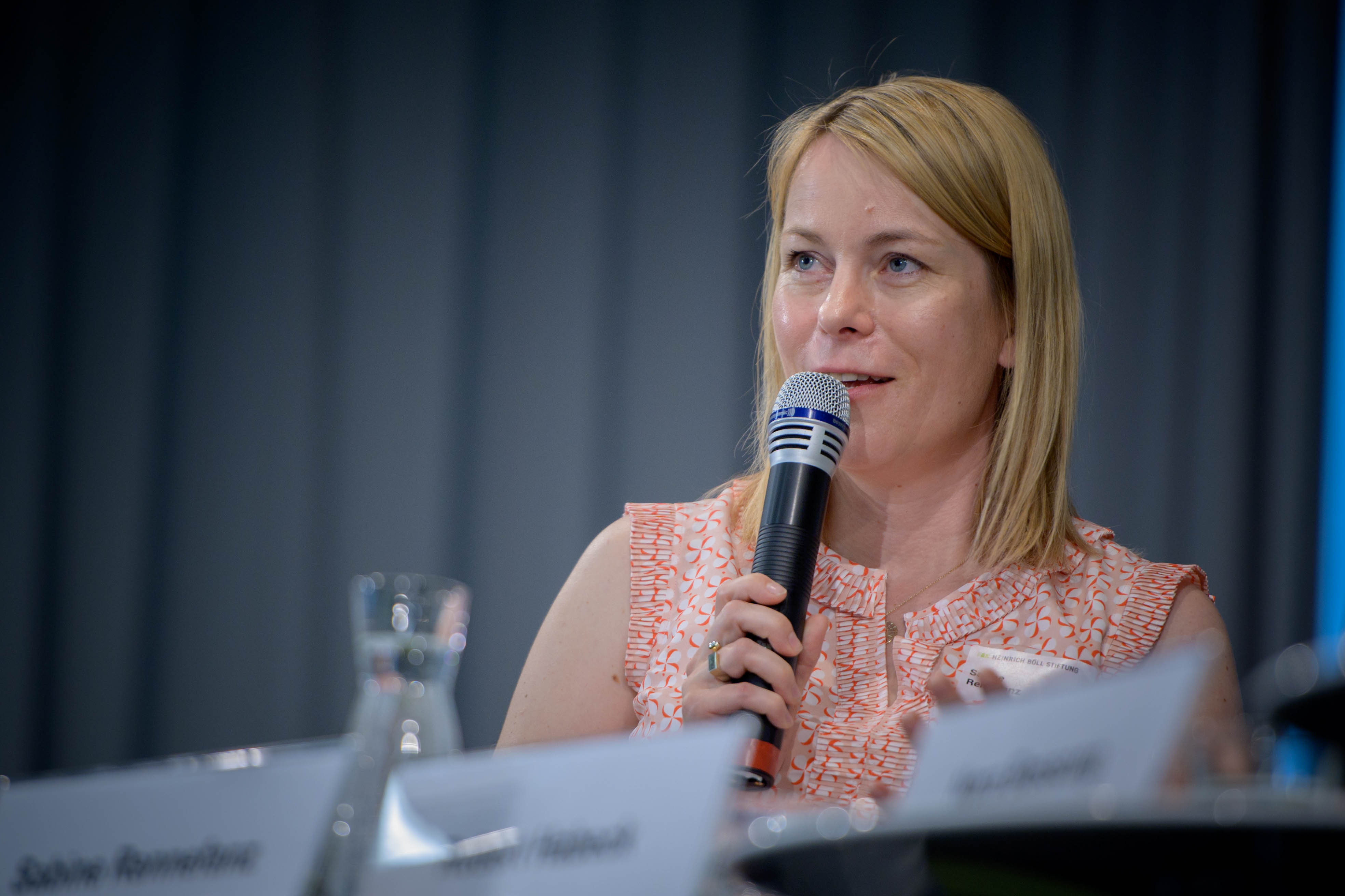 Sabine Rennefanz bei einer Veranstaltung der Heinrich-Böll-Stiftung